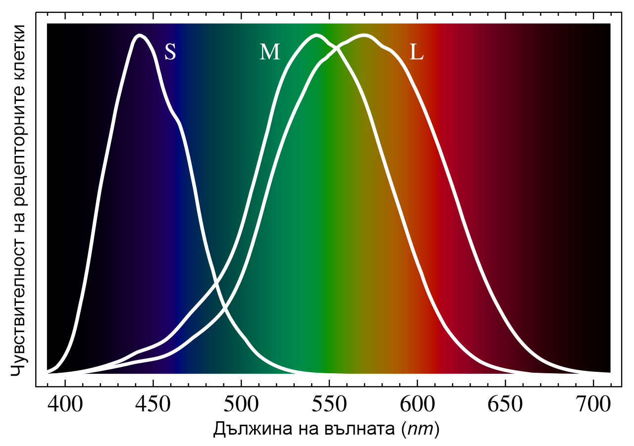 Чувствителност на рецепторните клетки към светлина във видимата част на електромагнитния спектър.